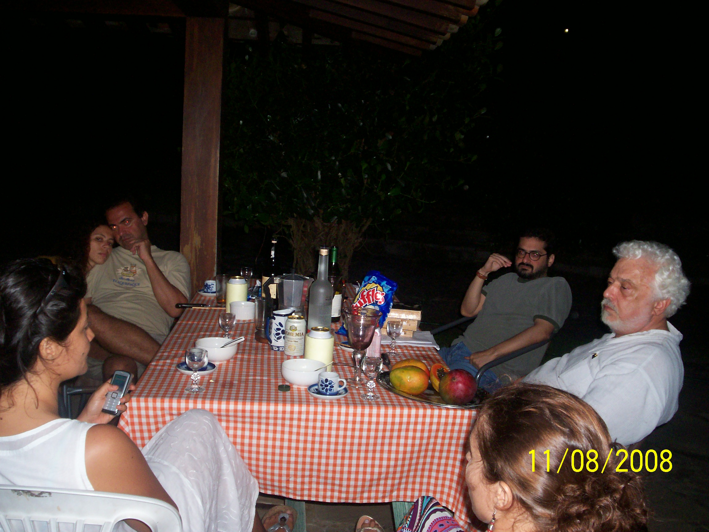 intelectual brasileiro